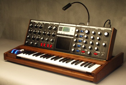 Sintetizzatore Moog Modular 55